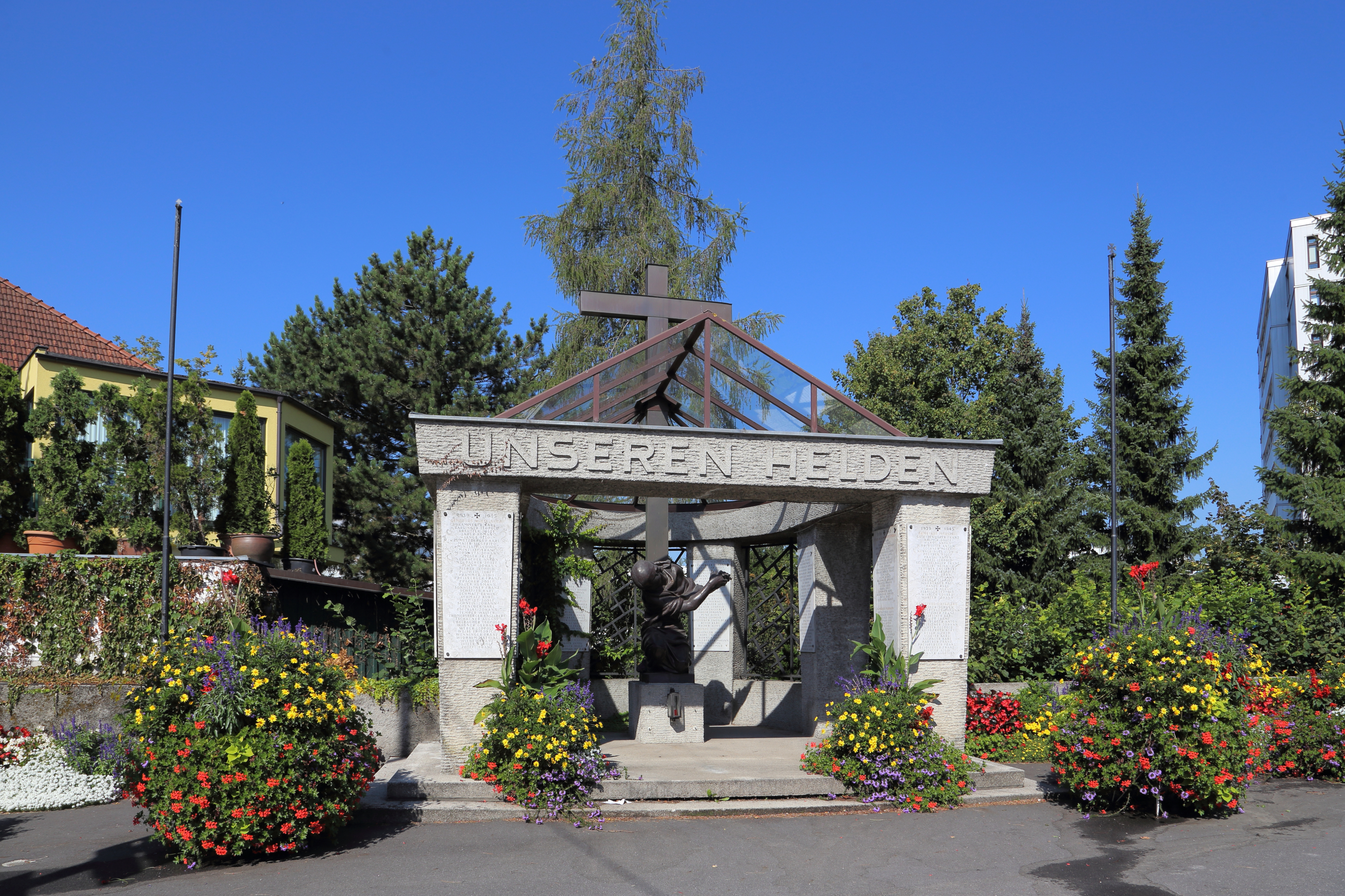 Kriegerdenkmal in Gedenken an die Gefallenen des II. Weltkrieges an der Kreuzung Scheibbserstraße/Pfarrhofgasse in der niederösterreichischen Stadt Wieselburg. 1932 nach Plänen von Anton Valentin errichtet und mit einer Plastik von Josef Riedl.